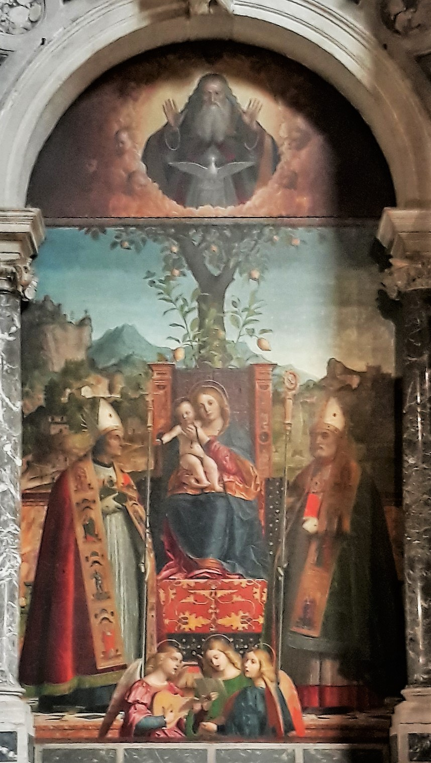 Dipinto "Madonna Della Cintura", tela di Girolamo Dai Libri, per altare laterale di sinistra della chiesa di San Giorgio in Braida a Verona